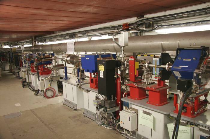 Bunch Compressor vom Freie Elektronen Laser FLASH am DESY in Hamburg. Veröffentlichung mit freundlicher Genehmigung DESY, Hamburg.